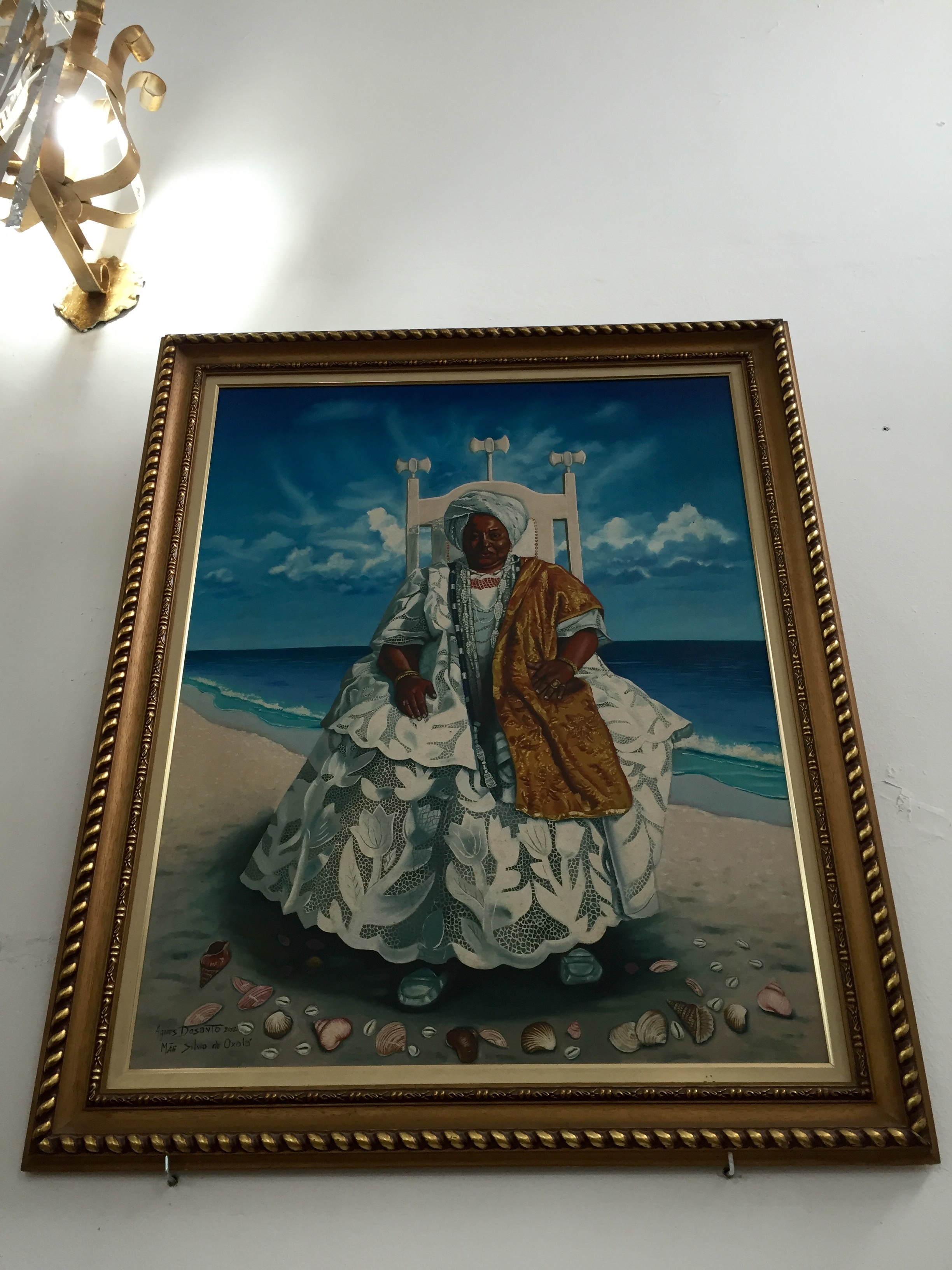 Quadro retratando a Mãe Sylvia de Oxalá, falecida em 2014, no Axé Ilê Obá, em São Paulo (SP), Brasil.